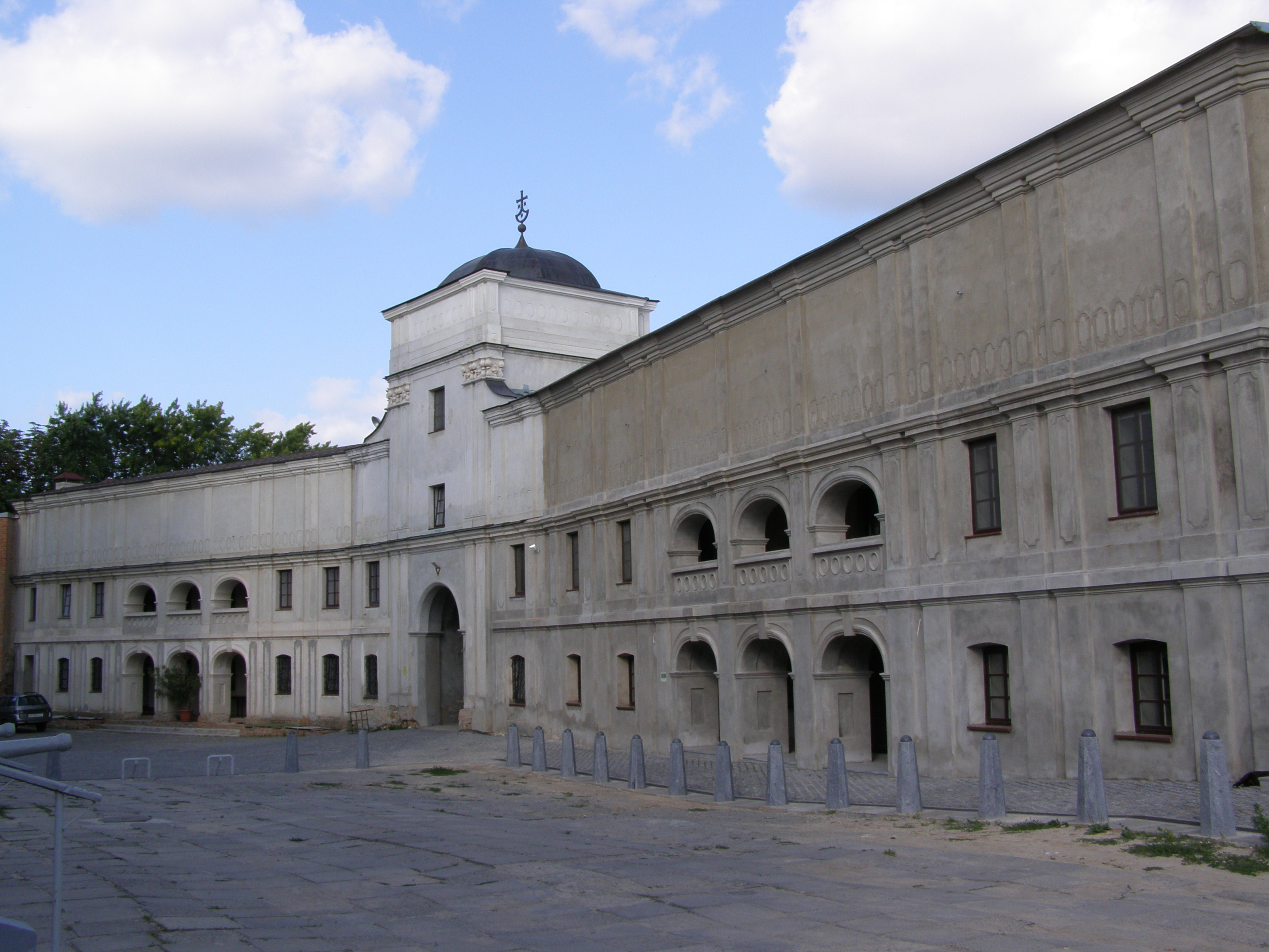 Прибрамний корпус (мур.), Бердичів, Радянська пл.